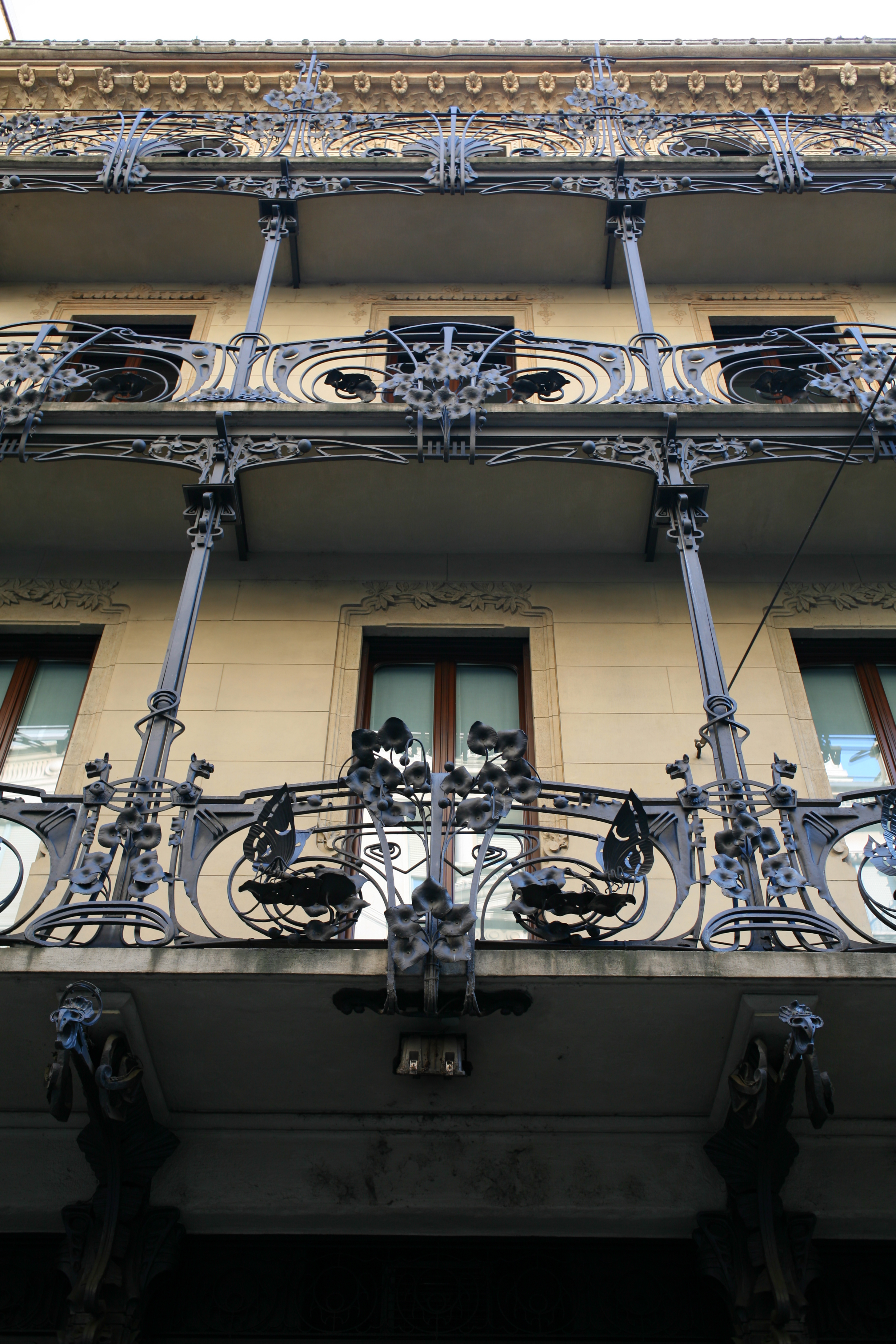 Casa Ferrario, Milano: particolare della della facciata, con i ferri battuti di Alessandro Mazzucotelli